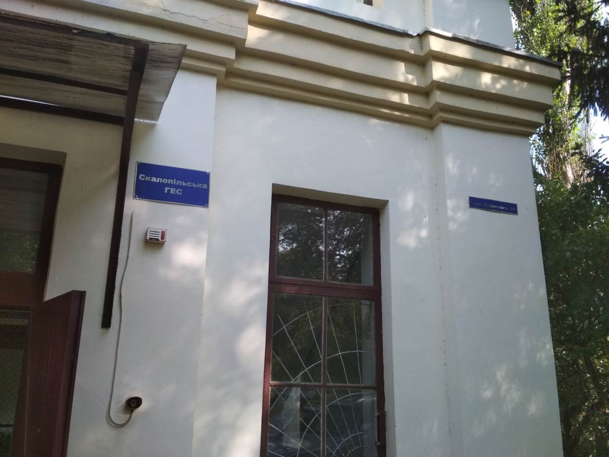 Скалопільська ГЕС